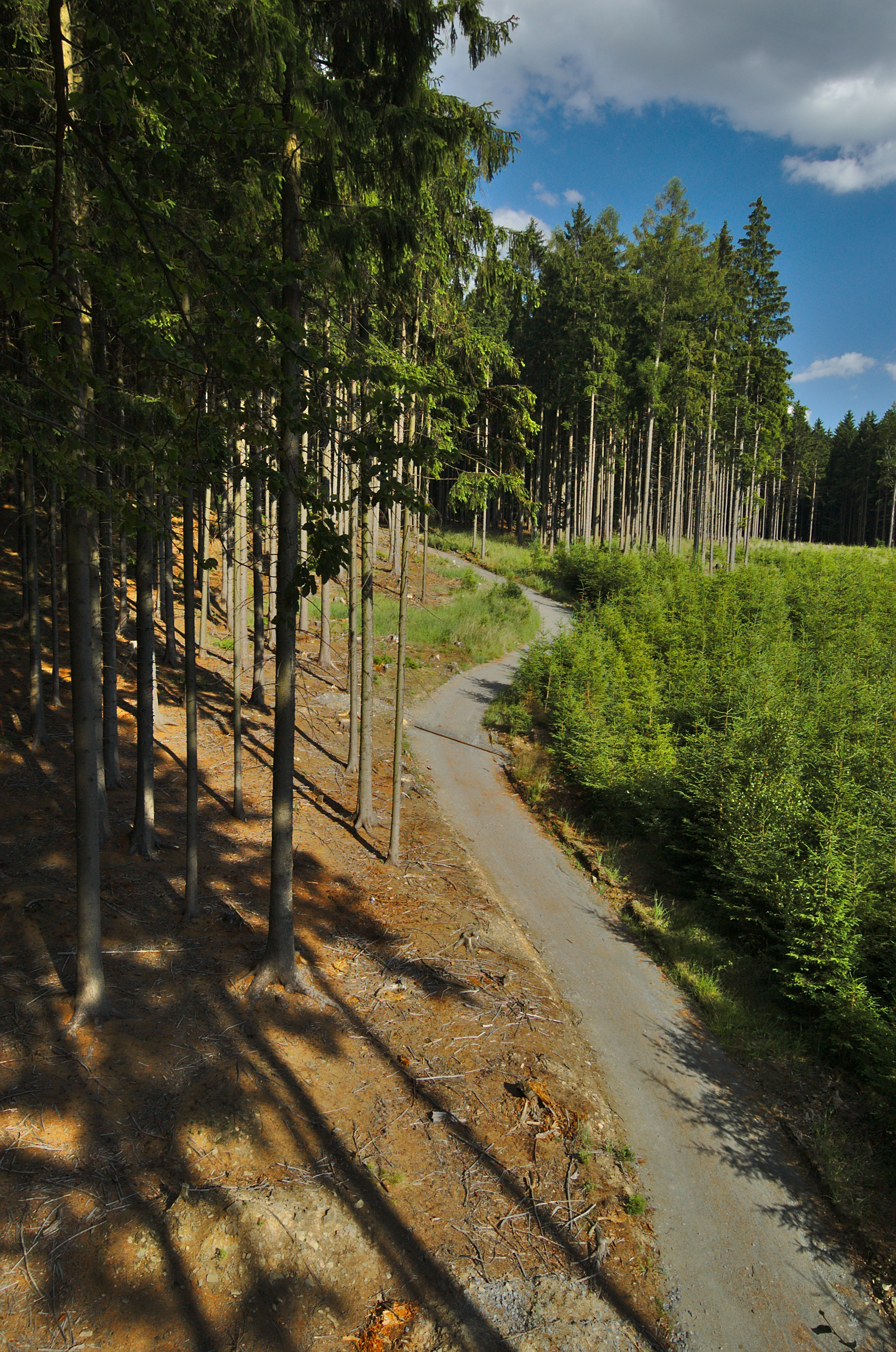 Pohled na smrkovou monokulturu z posedu, Protivanov, okres Prostějov